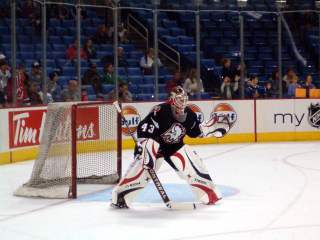 Martin Biron, Buffalo Sabres, hockey goaltender